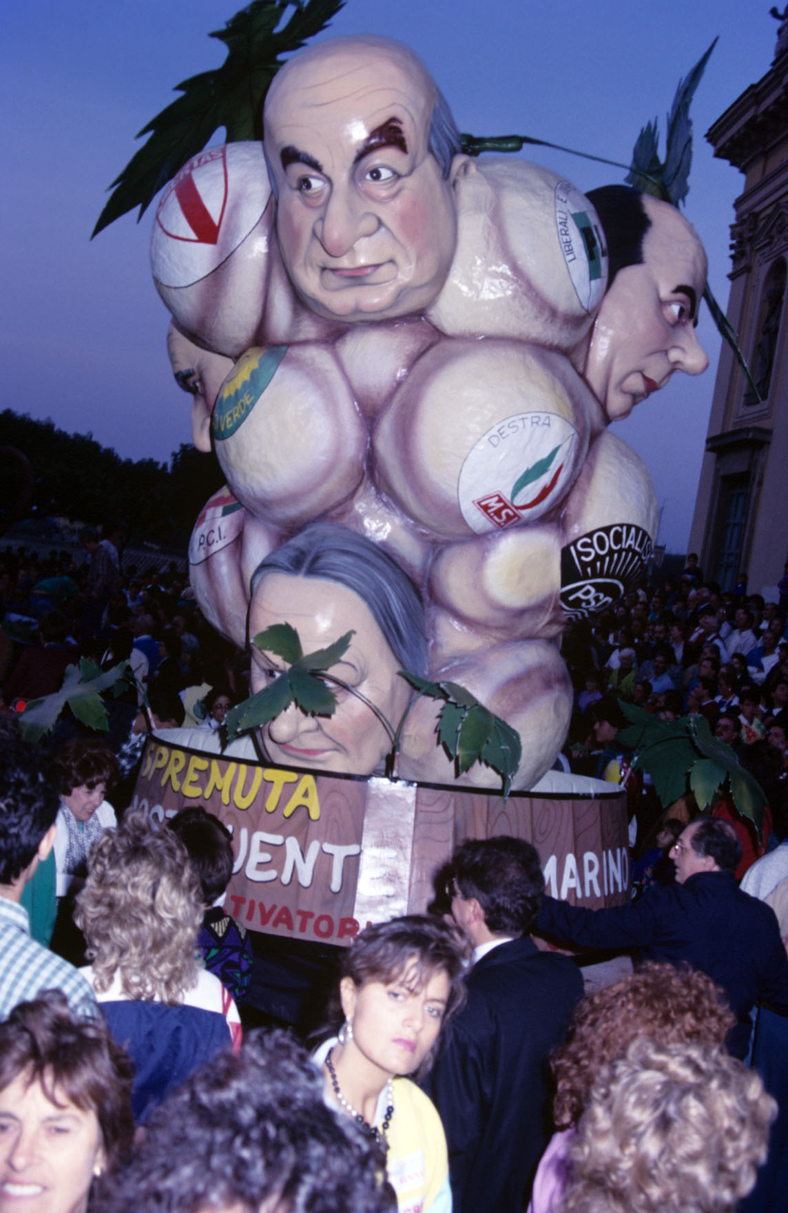 Carro satirico per la Sagra del 1987